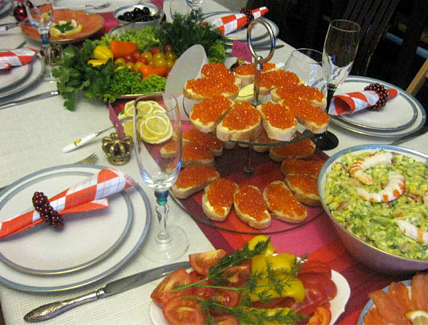 Дружеская складчина на новый 2012 год у нас дома